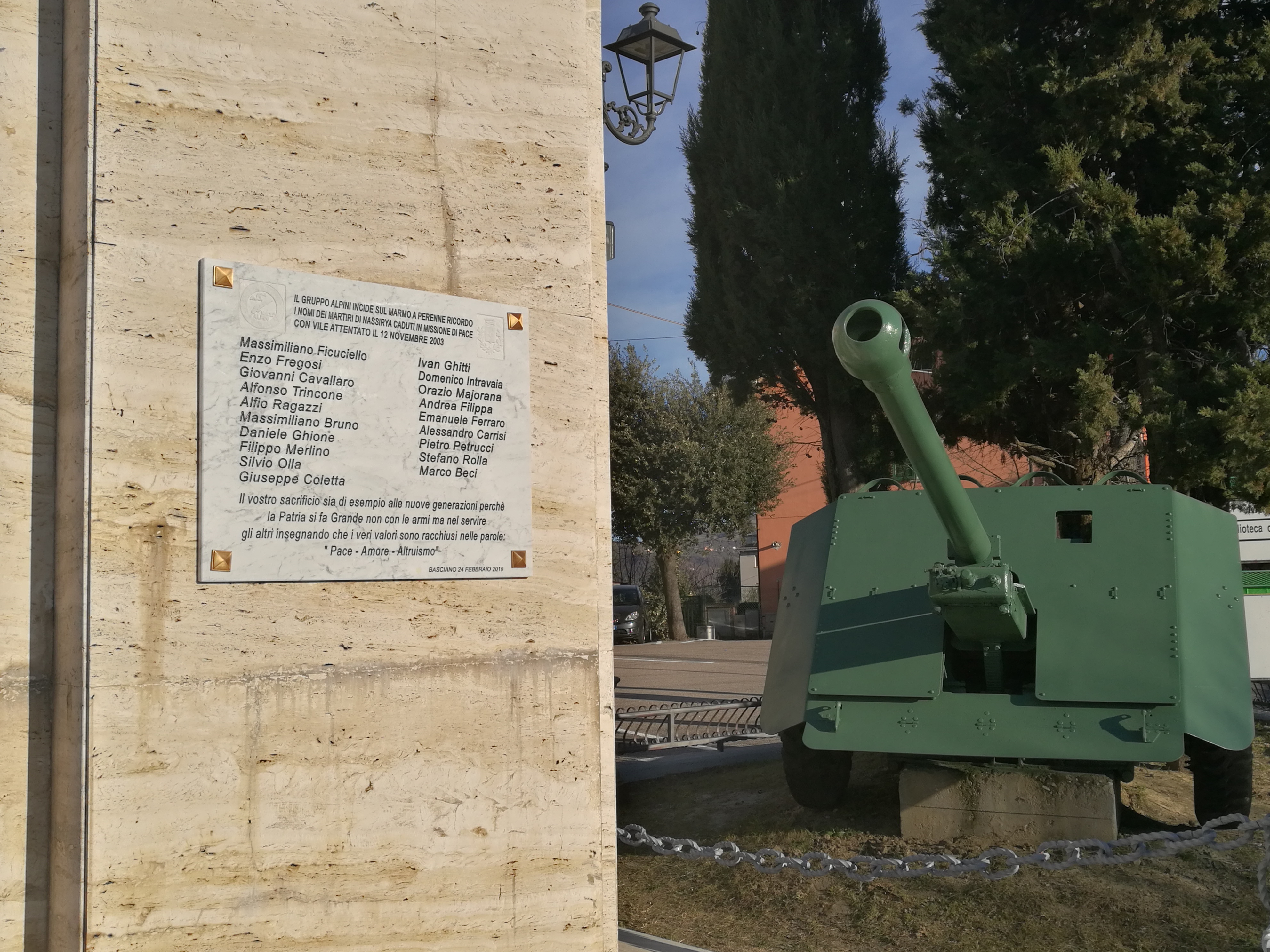 Monumento ai caduti di Nassiriya posto in piazza del municipio, Basciano (TE)